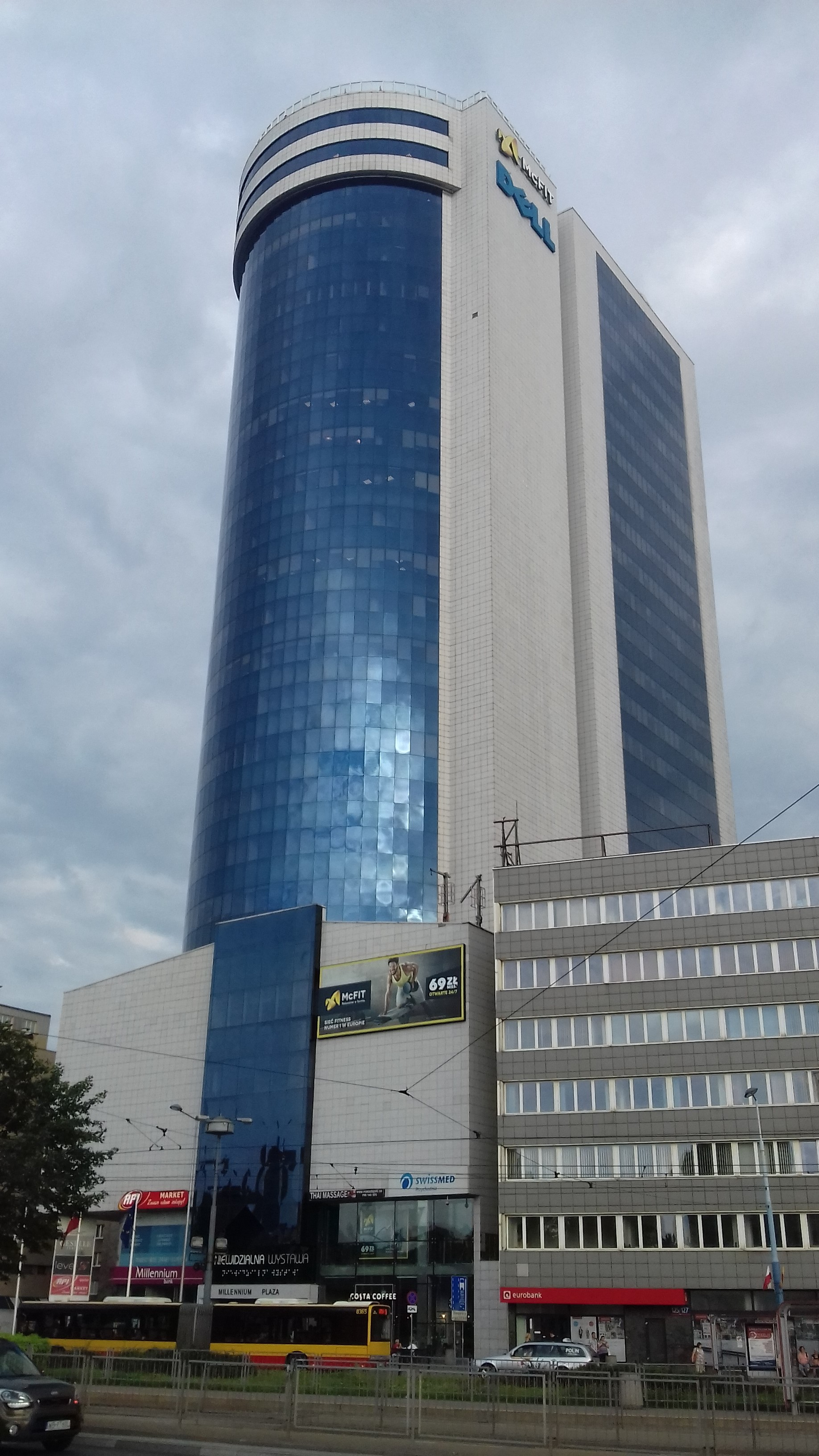 Millenium Plaza w 2017